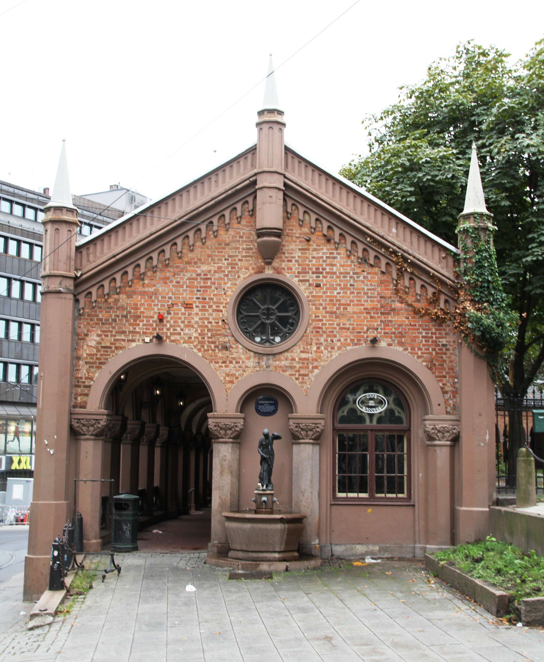 Kirkeristen er en gammel basarhall som omslutter Oslo domkirke i øst.